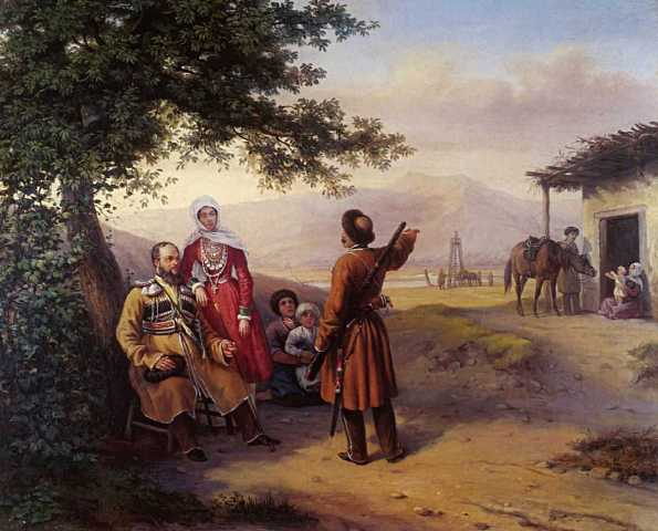 არნაუტოვების პორტრეტი, 1840-იანი წლები